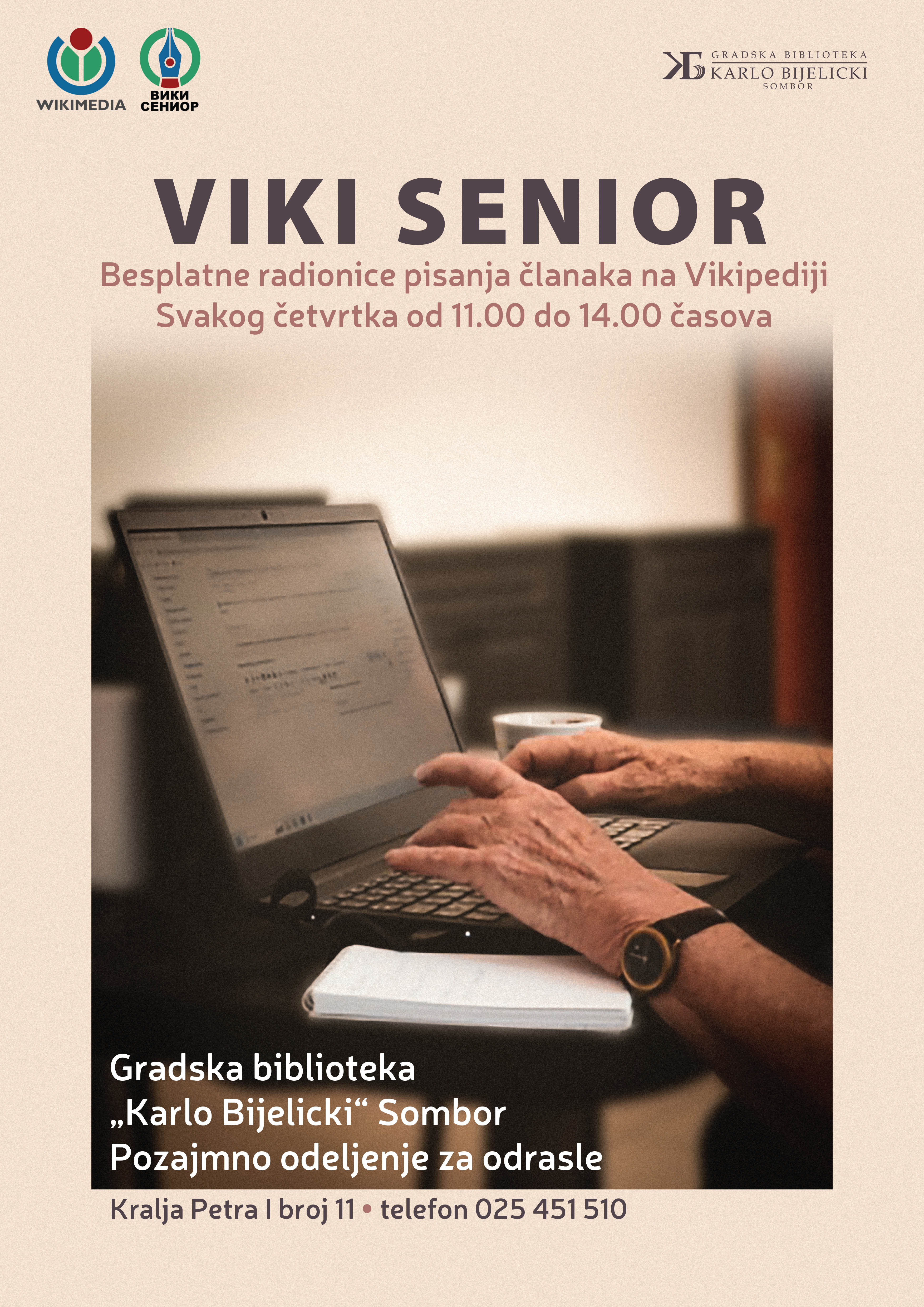 Plakat des Wettbewerbes "Biologie im Team"